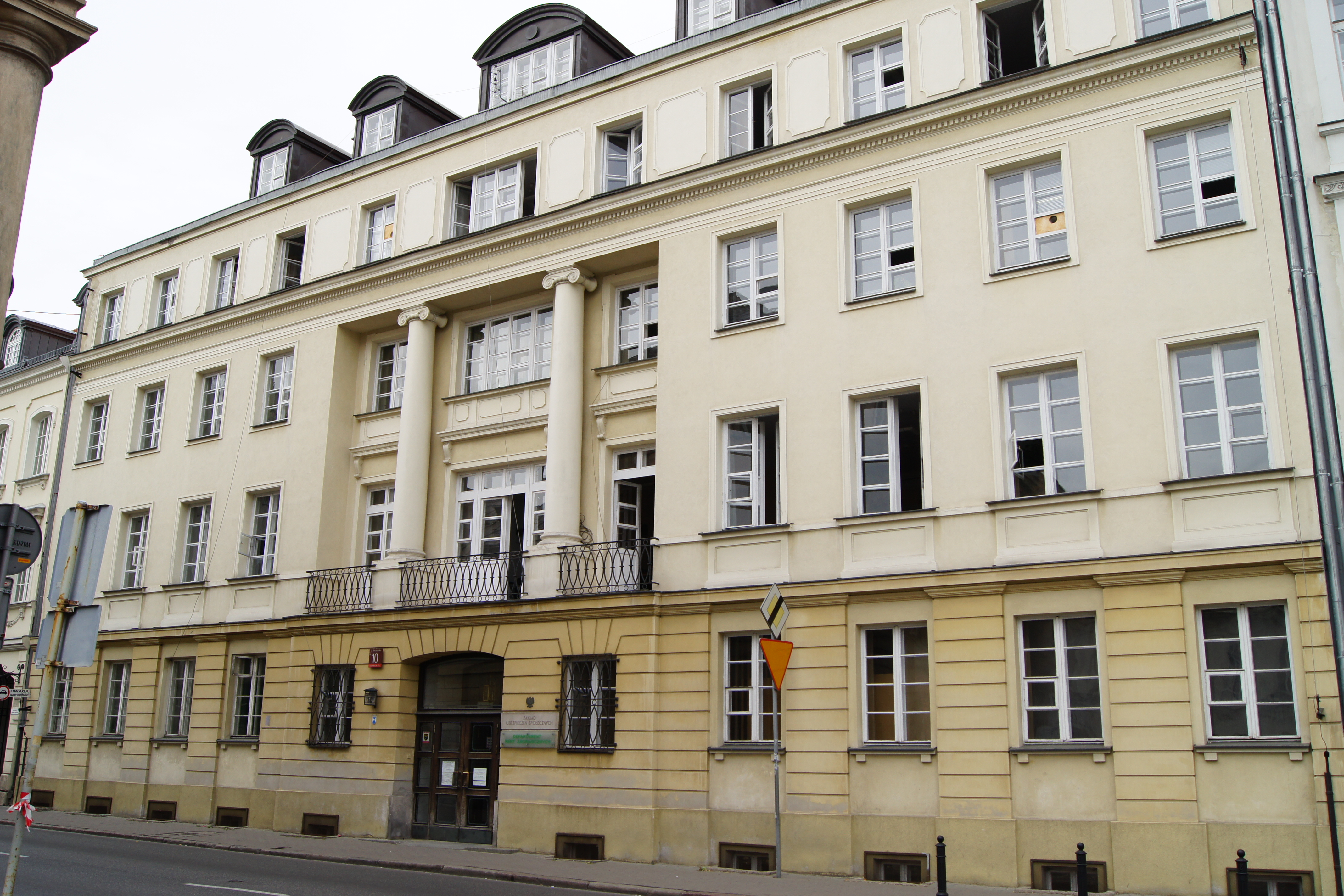 kamienica, ul. Senatorska 10, Warszawa, dz. Śródmieście